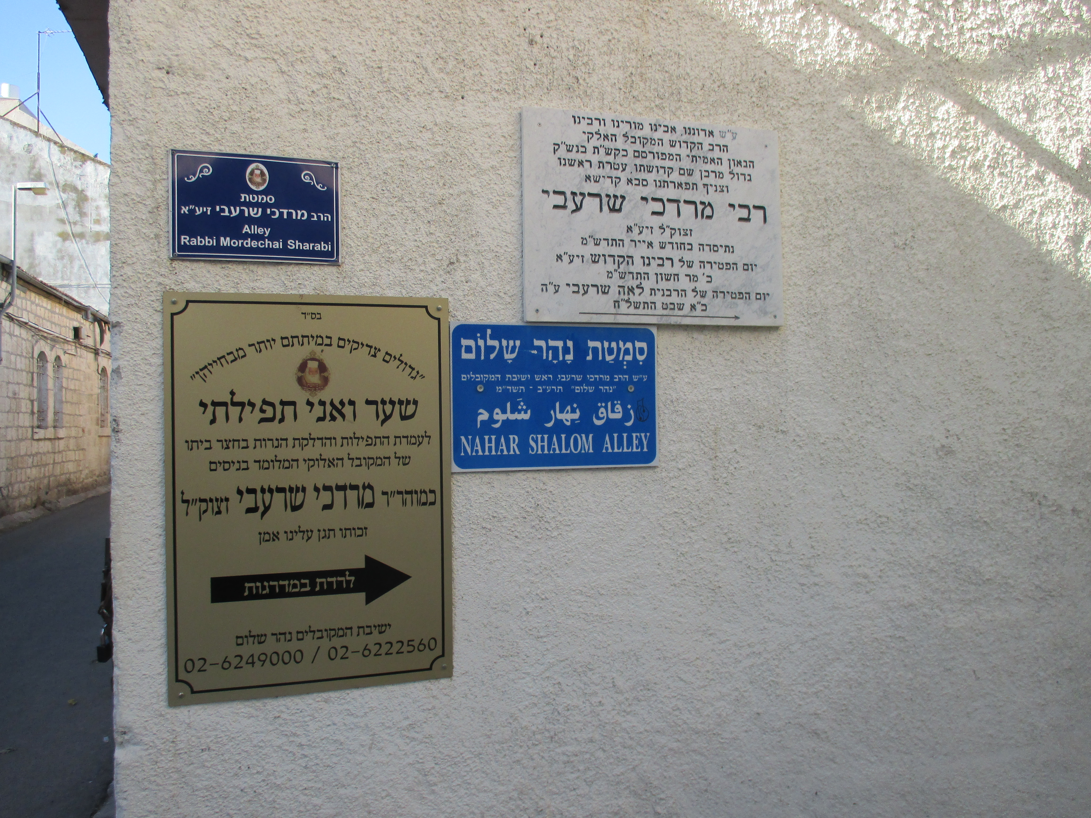 סמטת נהר שלום בסמוך לבית בו היה הרב מרדכי שרעבי גר